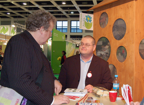 Alexander Süßmair aus Bayern im Gespräch mit Messebesuchern